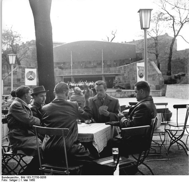 Berlin, Prenzlauer Berg, Prater Zentralbild Seliger 1.5.1960 Berlin: 1.Mai 1960 "Mit Musik und froher Laune ..." Volksfest in allen Stadtbezirken Frohe Festtagsstimmung, gute Laune und Fröhlichkeit herrschten am Nachmittag des 1. Mai auf den Volksfesten im Stadtzentrum und in den Stadtbezirken des demokratischen Berlin. UBz: Fröhliche Skatrunde im neueröffneten Prater im Bezirk Prenzlauer Berg.